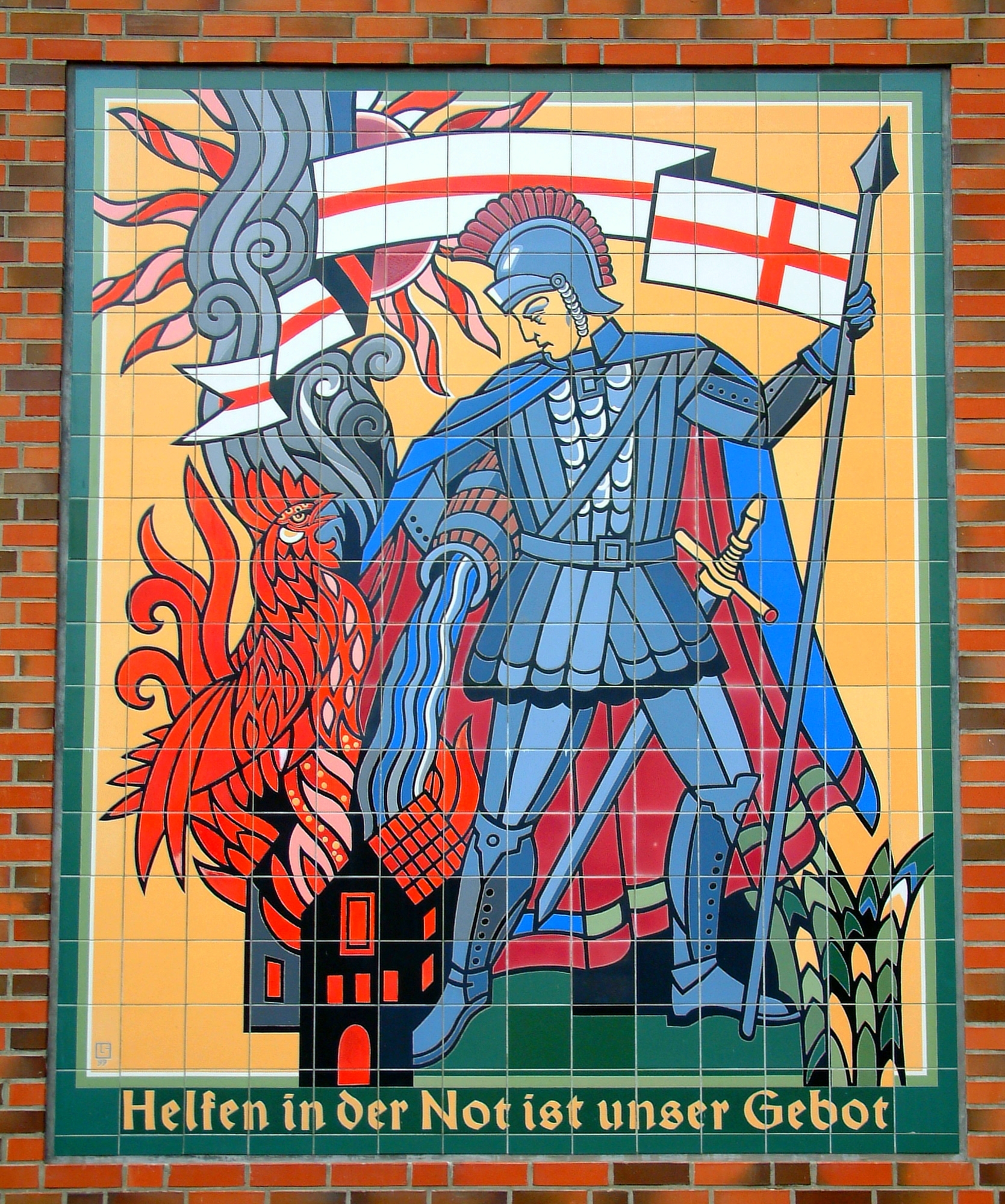 Wandbild des heiligen Florian an der Feuerwehrwache Boizenburg. Geschaffen 1999 von Diplom-Baukeramiker und Baugestalter Lothar Scholz. Glasurmalerei auf Steinzeugfliesen; 9,52 m².